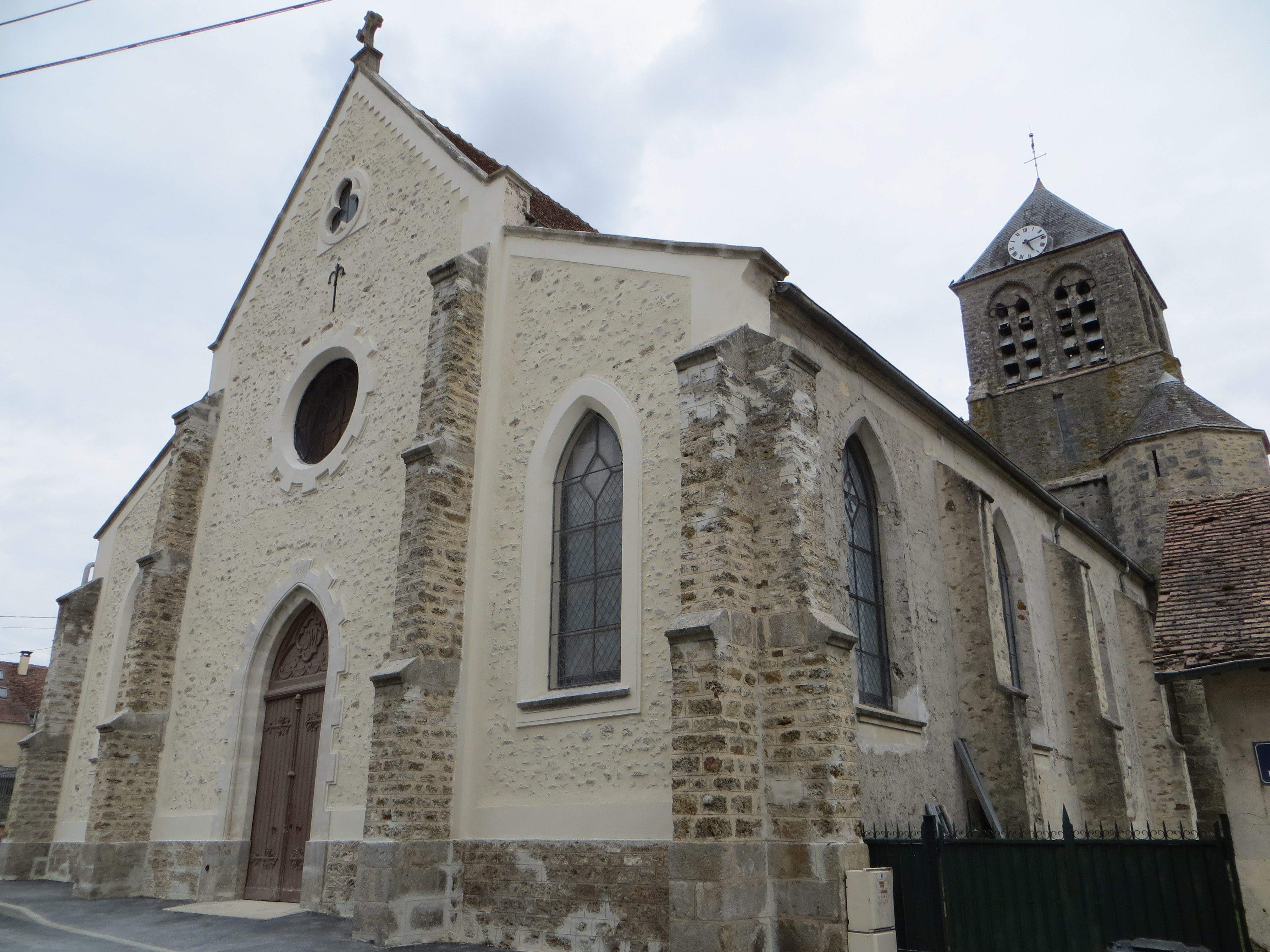 Église Saint-Martin de Saints